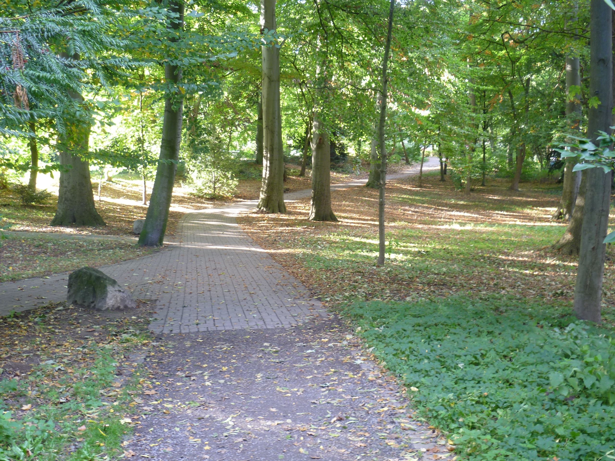 Rosenthal im Fischerglacis Minden